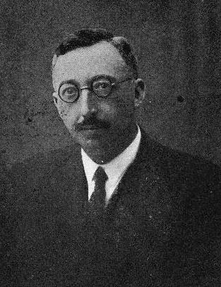 Eugenio Vázquez Gundín, fotografía en Vida Gallega 1934